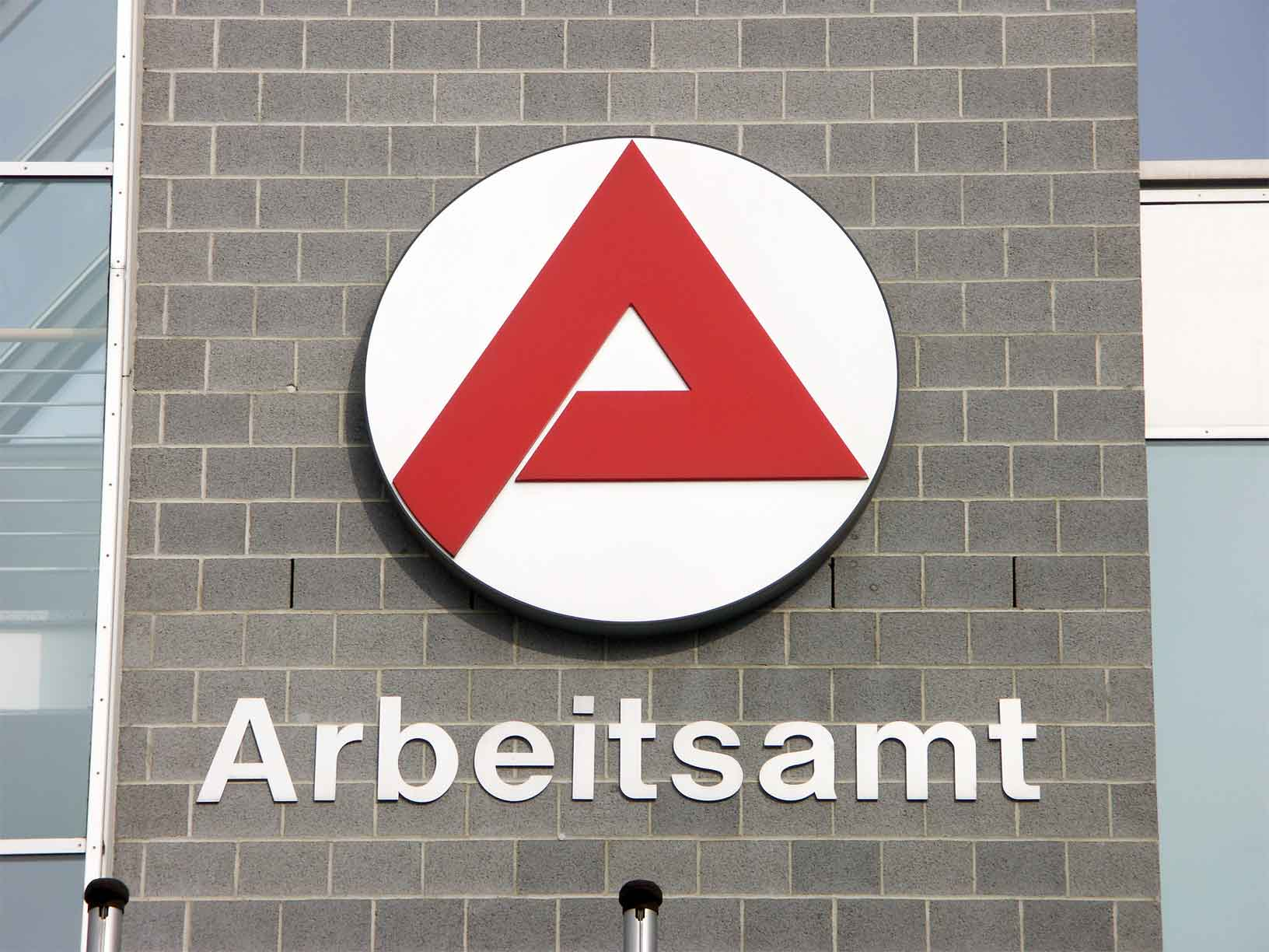 Altes Logo der Arbeitsagentur/ ehemals Arbeitsamt; Fassade Arbeitsagentur Leipzig; eigenes Foto 24-02-2006